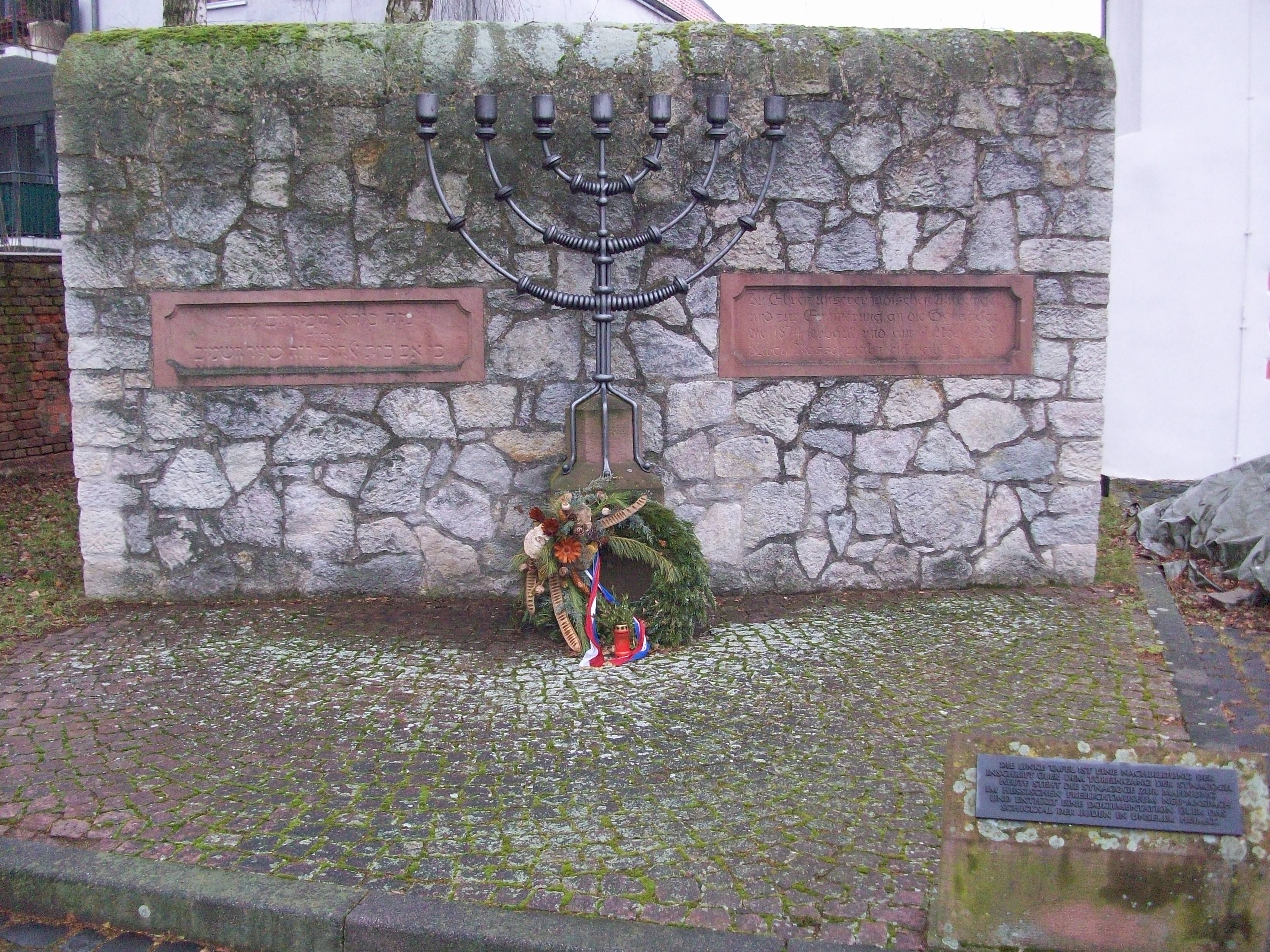 Mahnmal zur jüdischen Synagoge in Groß-Umstadt nahe dem Darmstädter Schloss